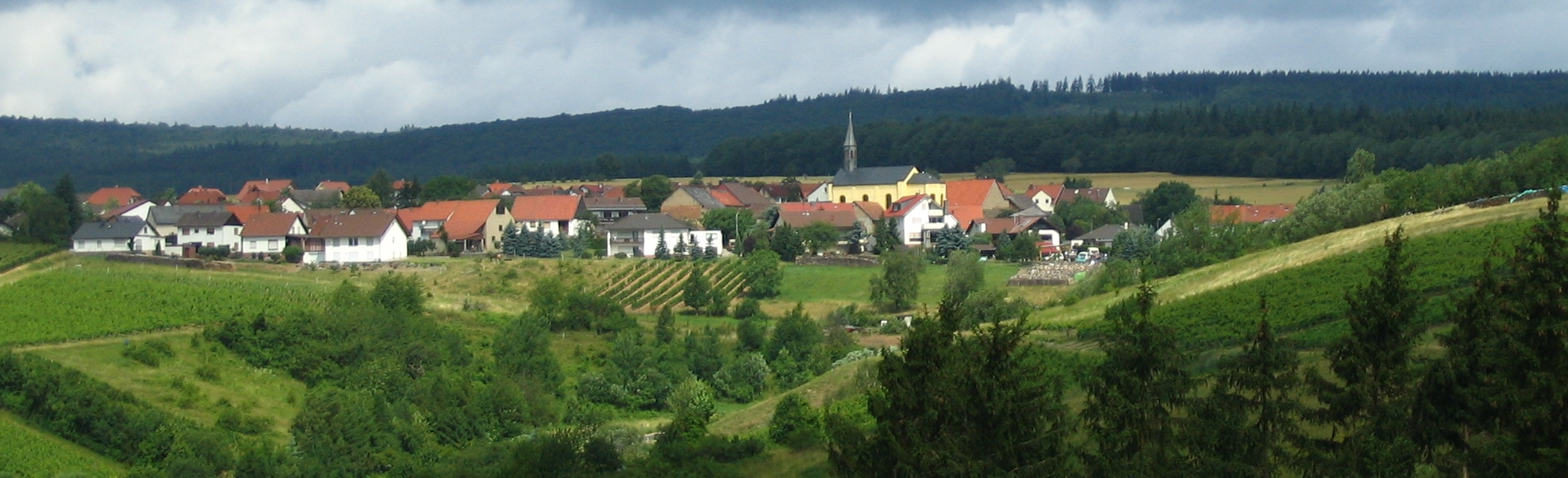 Hergenfeld im Naheland